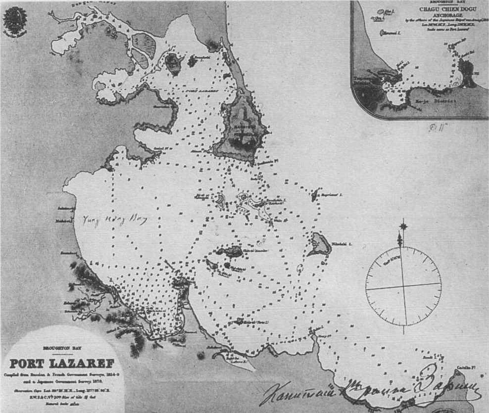 Карта места гибели крейсера I ранга «Витязь». В правом нижнем углу — подпись командира корабля капитана 1 ранга С. А. Зарина